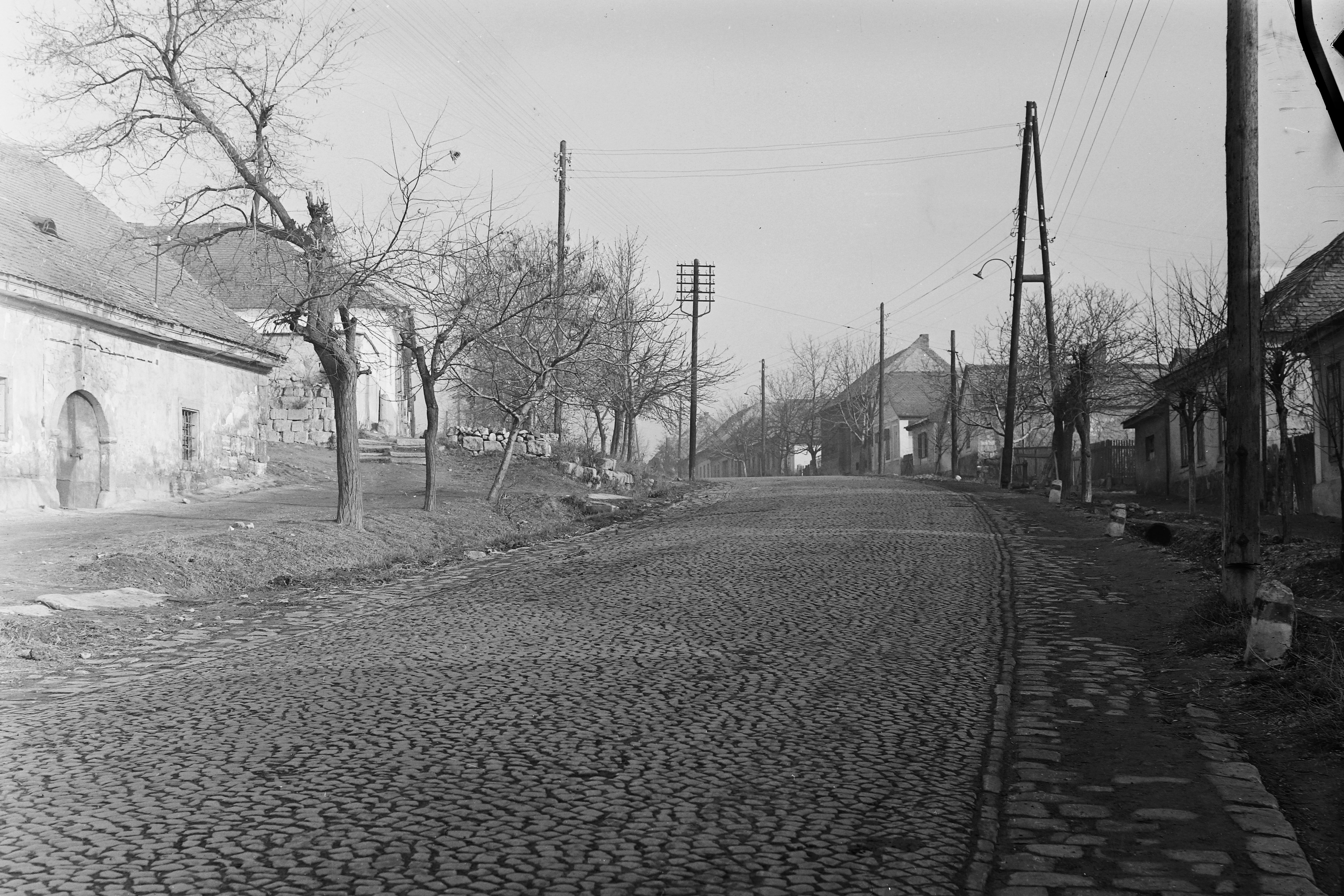 Budapesti út a Templom tér felől nézve. Location: Hungary, Budaörs Tags: aerial wire Title: Budapesti út a Templom tér felől nézve.